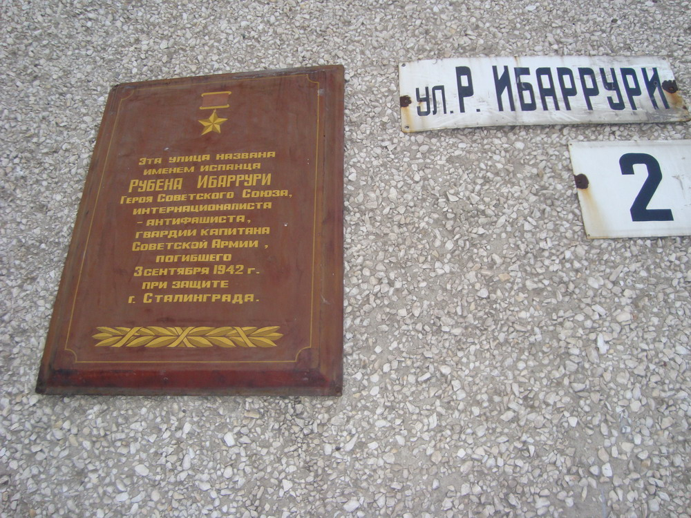 Placa situada en la casa número 2, de la calle que lleva su nombre en la ciudad de Lípetsk, Rusia.